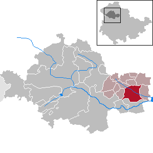 Bad Tennstedt in Thuringia - Unstrut-Hainich-Kreis